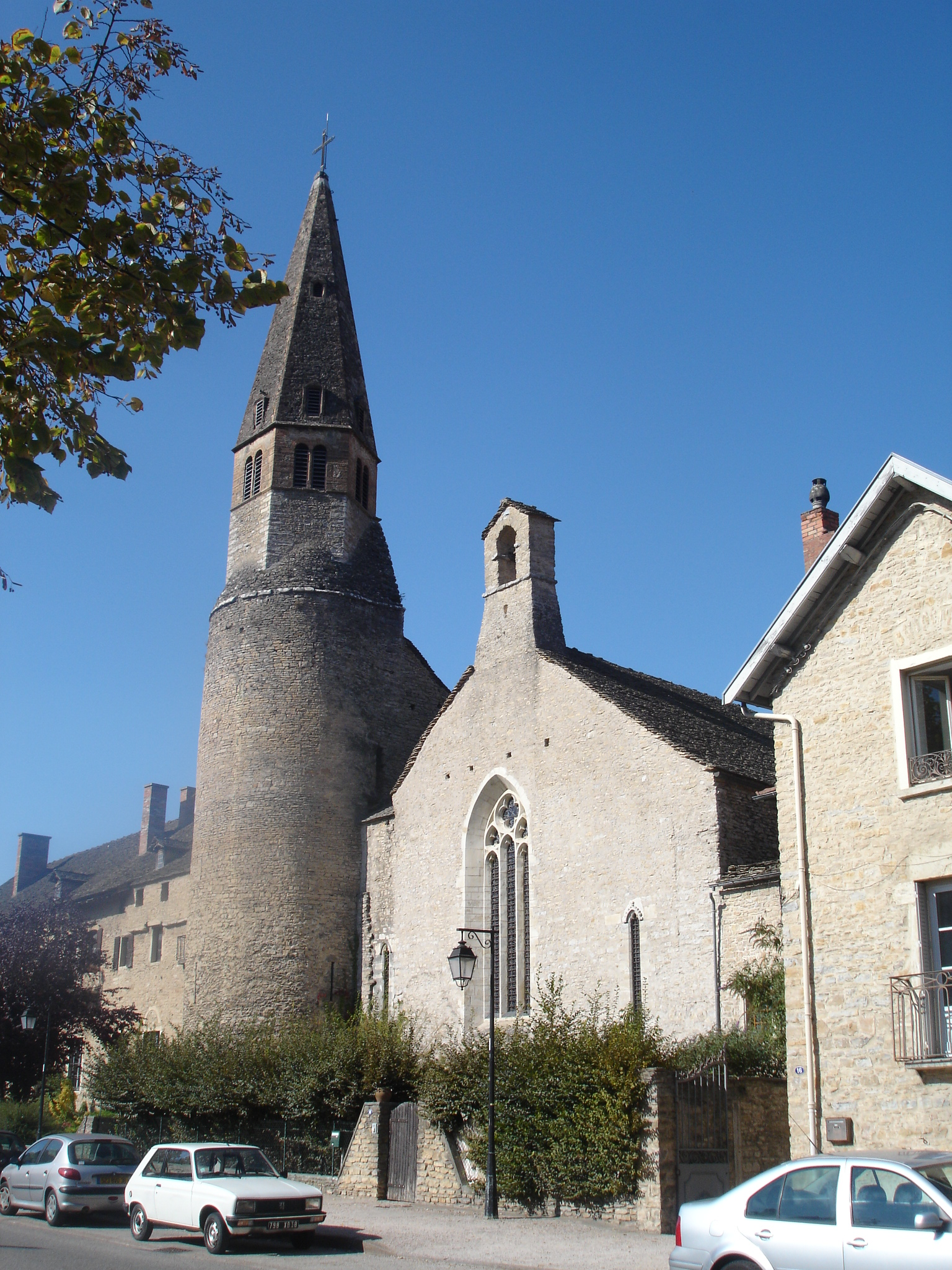 Village classé de Crémieu dans l'Isère (France) : son église fortifiée